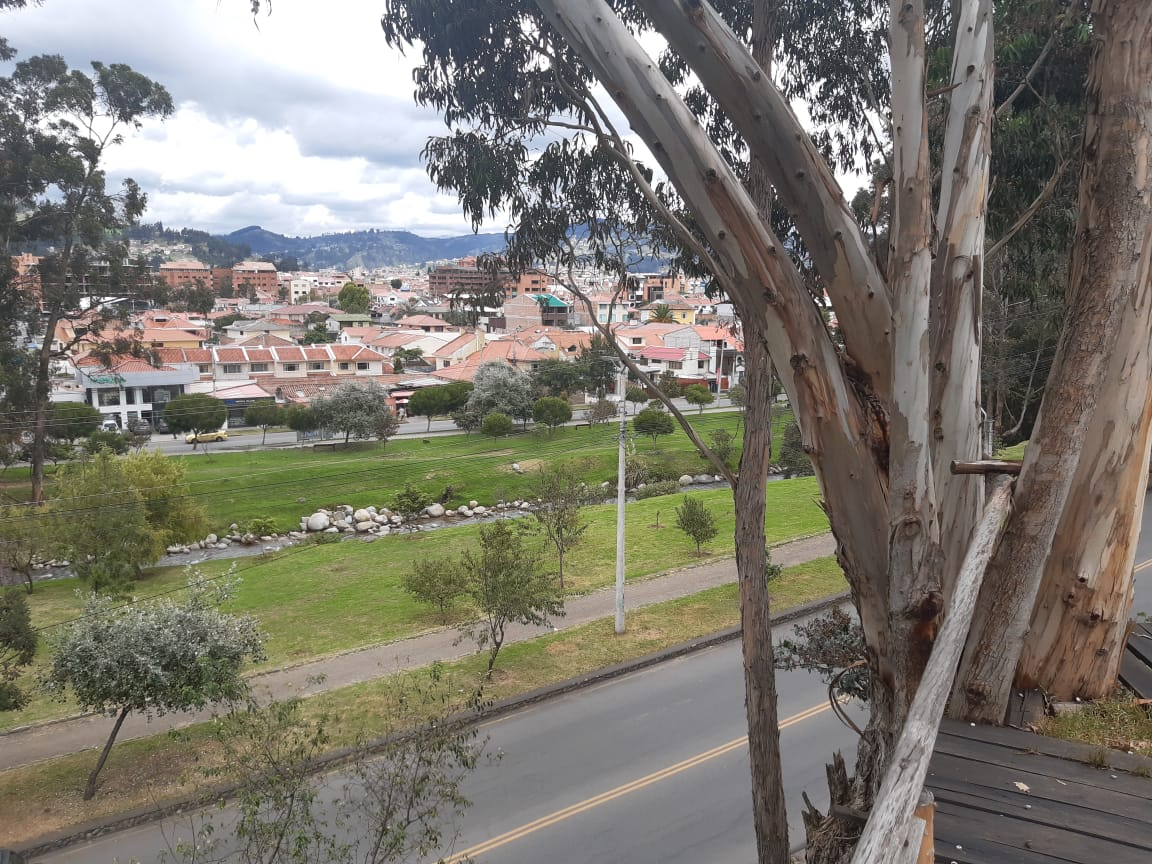 Vista paralela del río Yanuncay, uno de los principales en la ciudad de Cuenca.